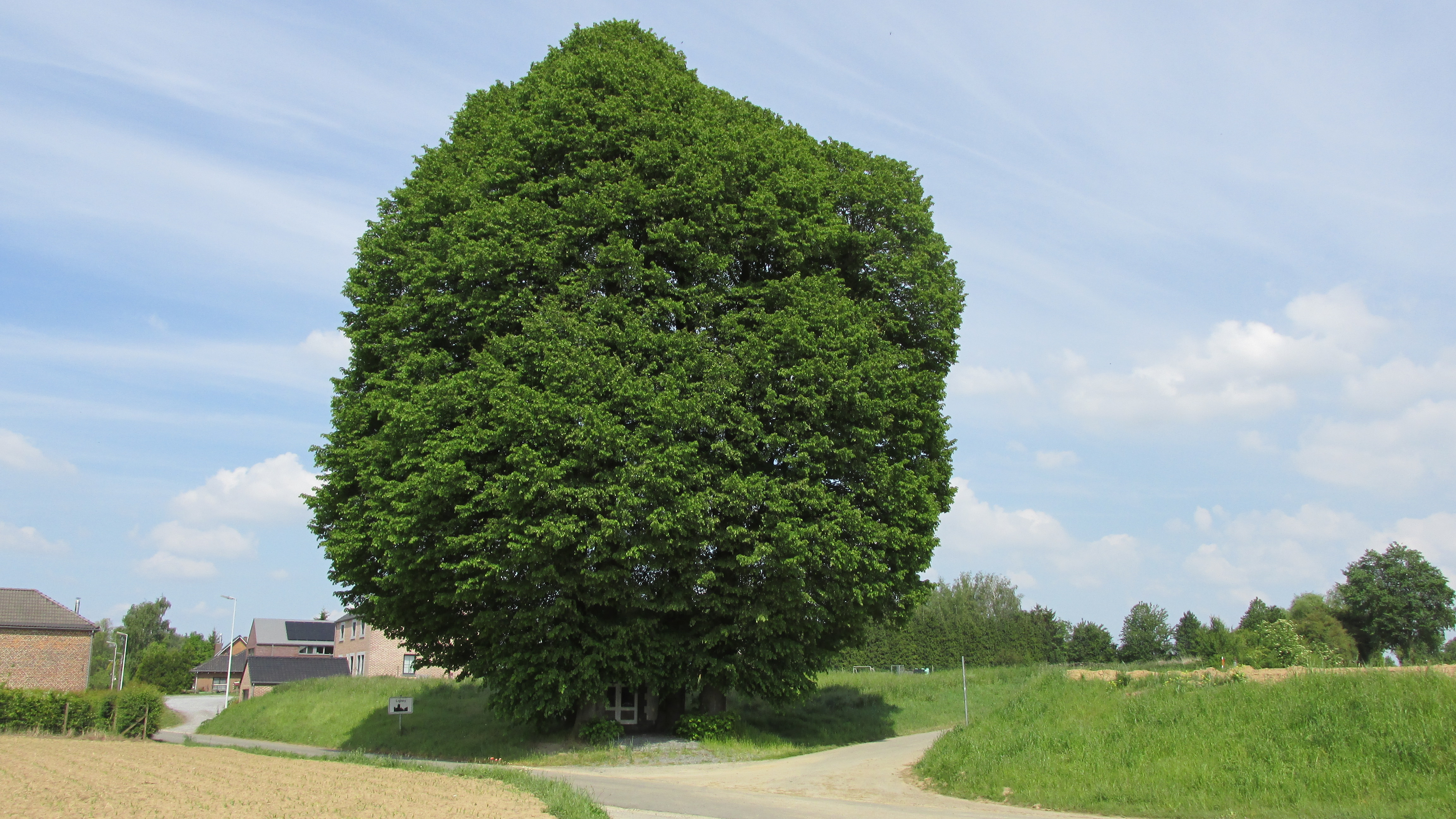 Maison